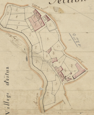 Aituà en el Cadastre napoleònic del 1812 (Arxius Departamentals dels Pirineus Orientals)